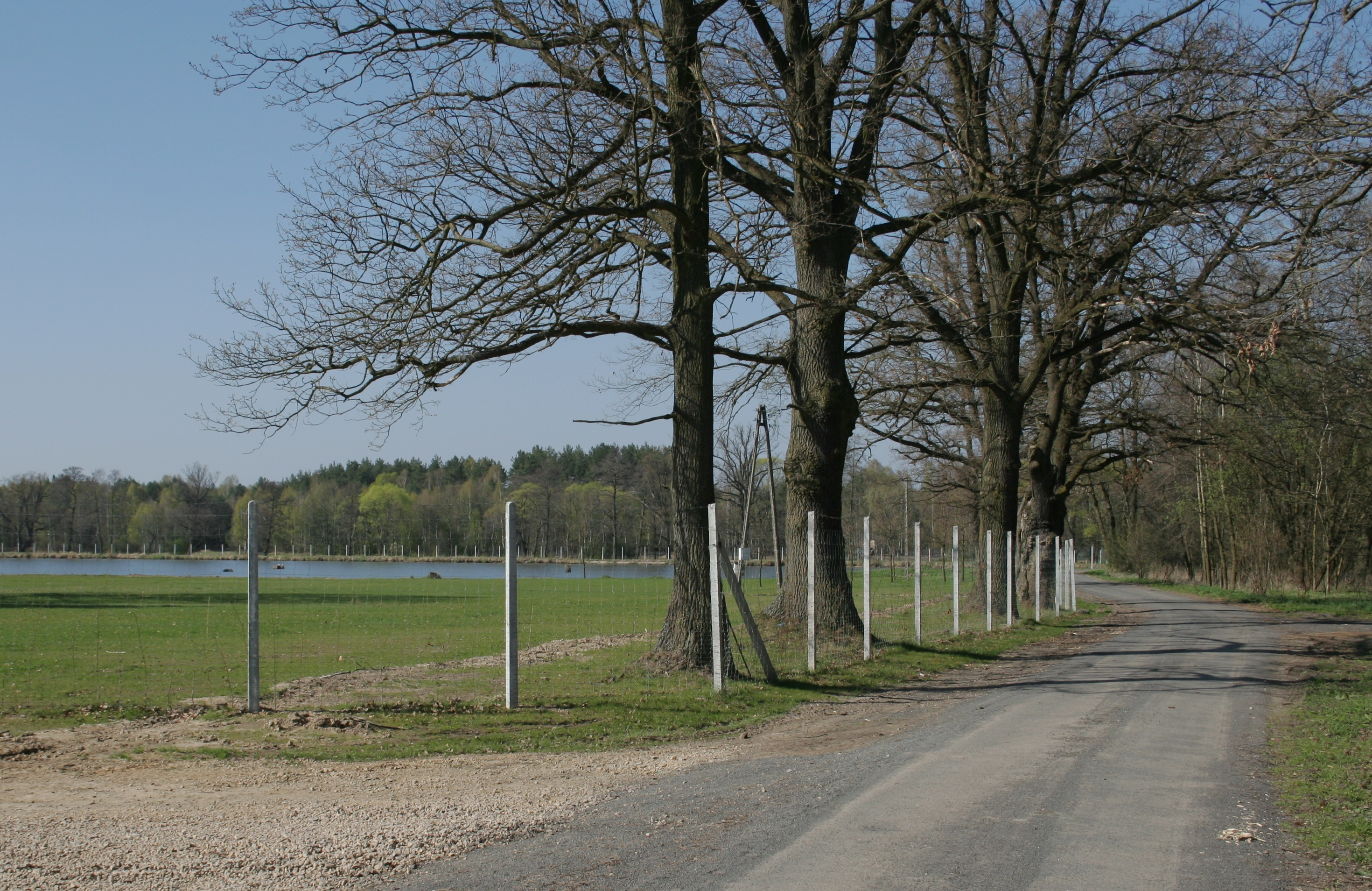 Droga w przysiółku Doły, gmina Boronów